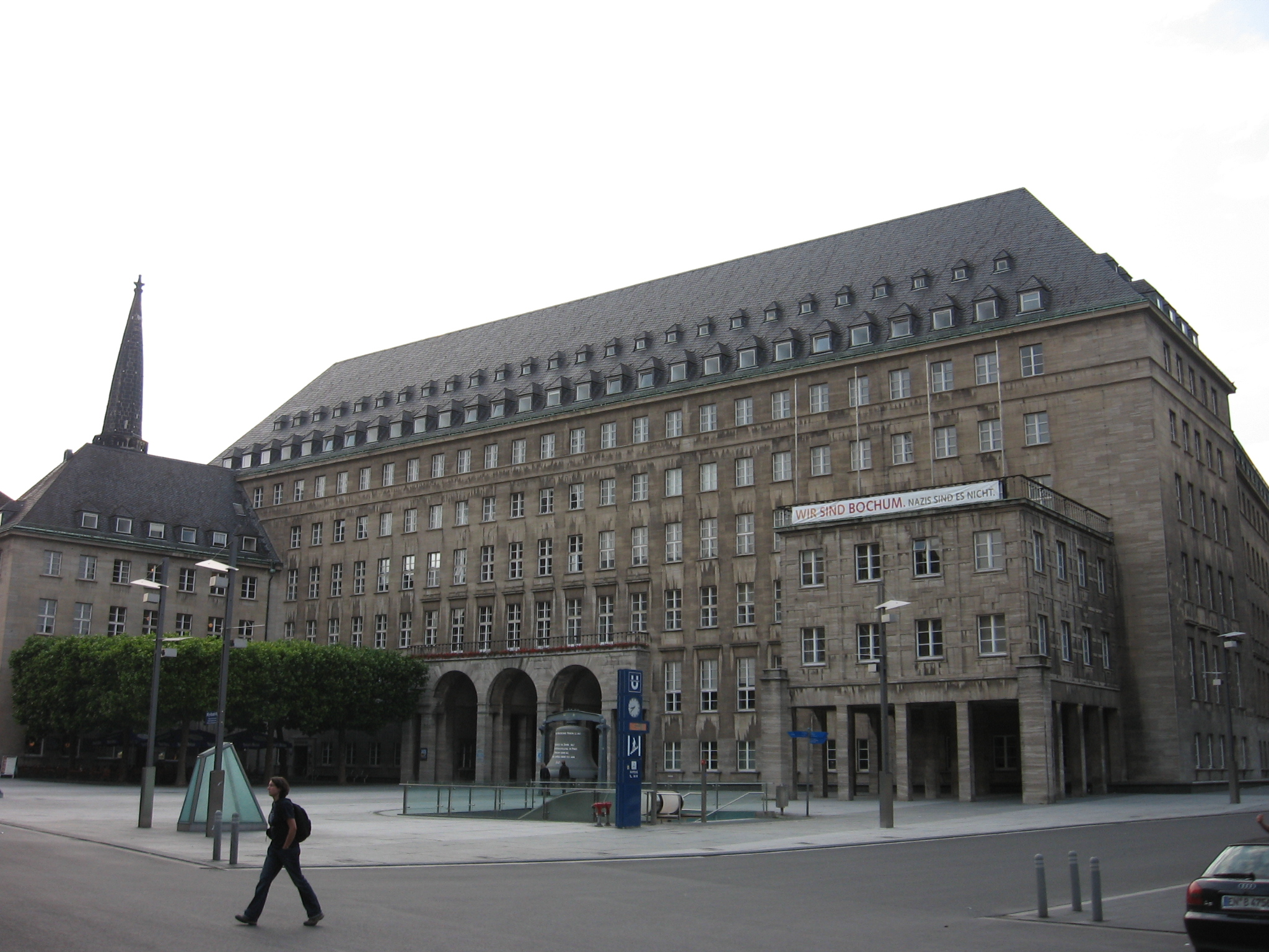 Rathaus Bochum